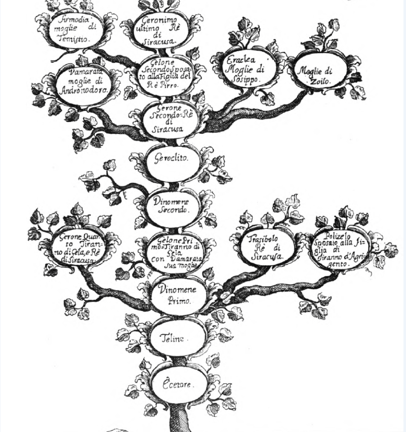 L'Albero Geneaologico dei Dinomenidi, disegnato da Carlo Filiberto Pizolanti.